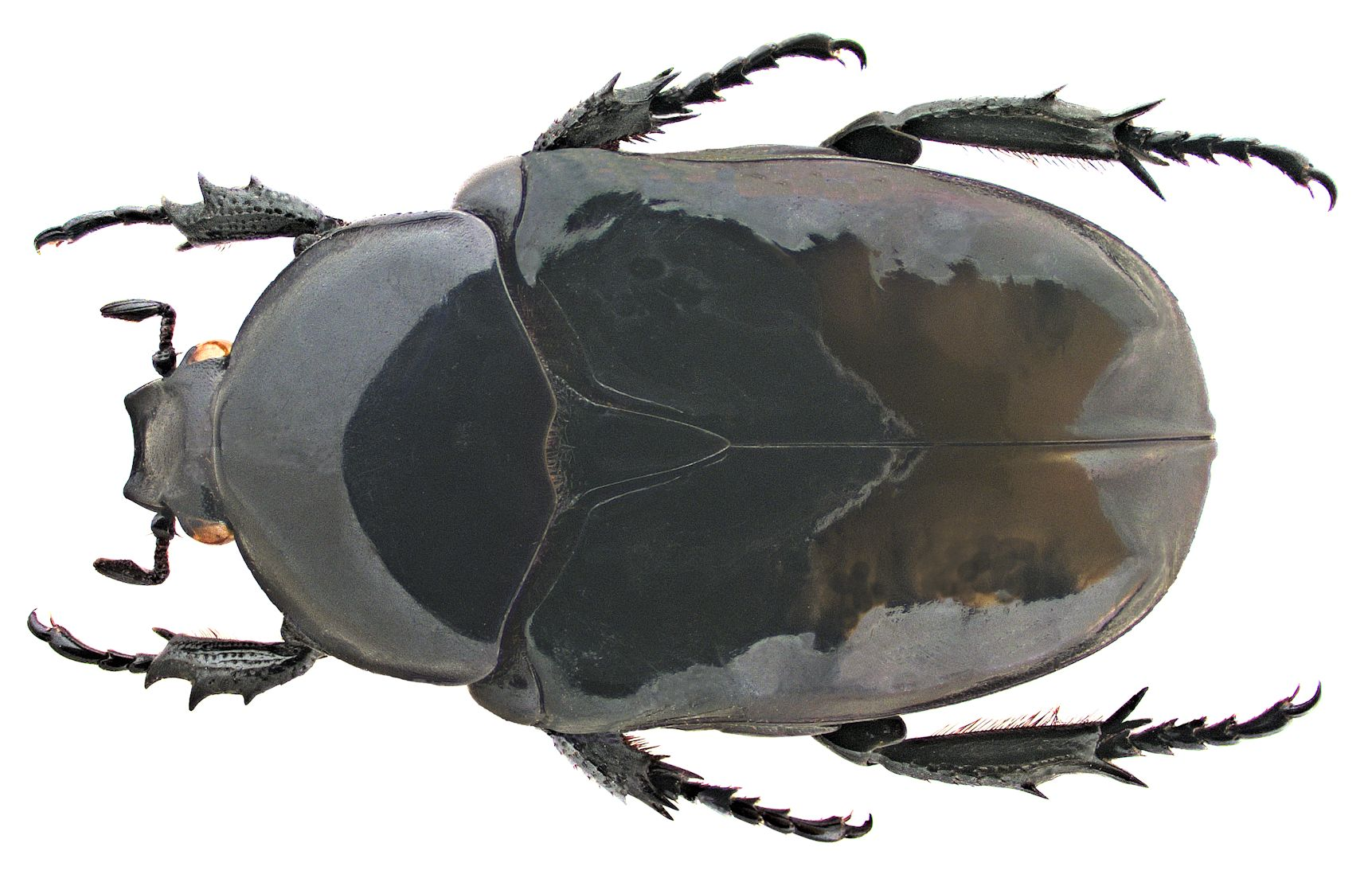 Familie: Scarabaeidae Groesse: 23 mm Verbreitung: Ost- bis Südafrika Fundort: Kenia, Nandi-Prov., Kipsamoite, 1900 m leg. U.Eitschberger, 1997; det. U.Schmidt Photo: U.Schmidt, 2006